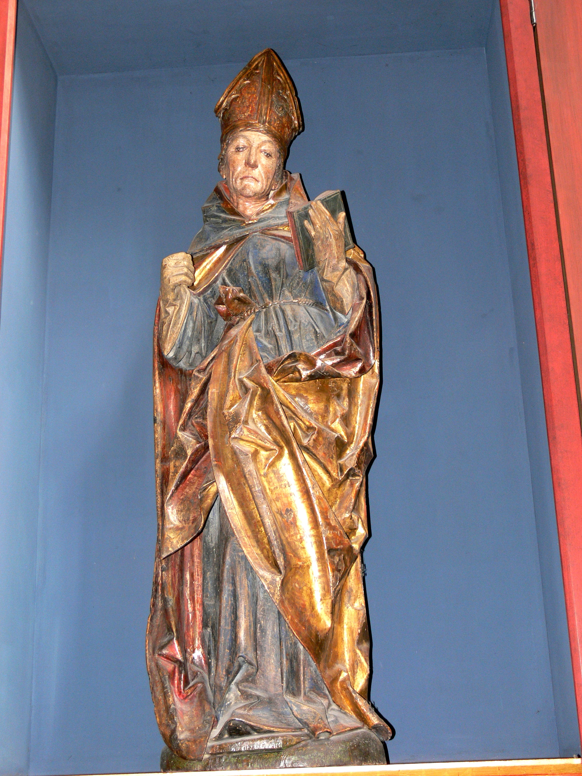 St.Ludwig von Toulouse. Altarfigur in St.Jakob in Rothenburg ob der Tauber von Tilman Riemenschneider